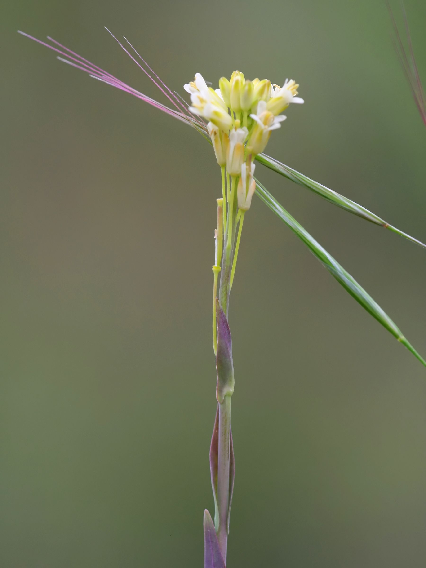 Kahle Gänsekresse (Turritis glabra)